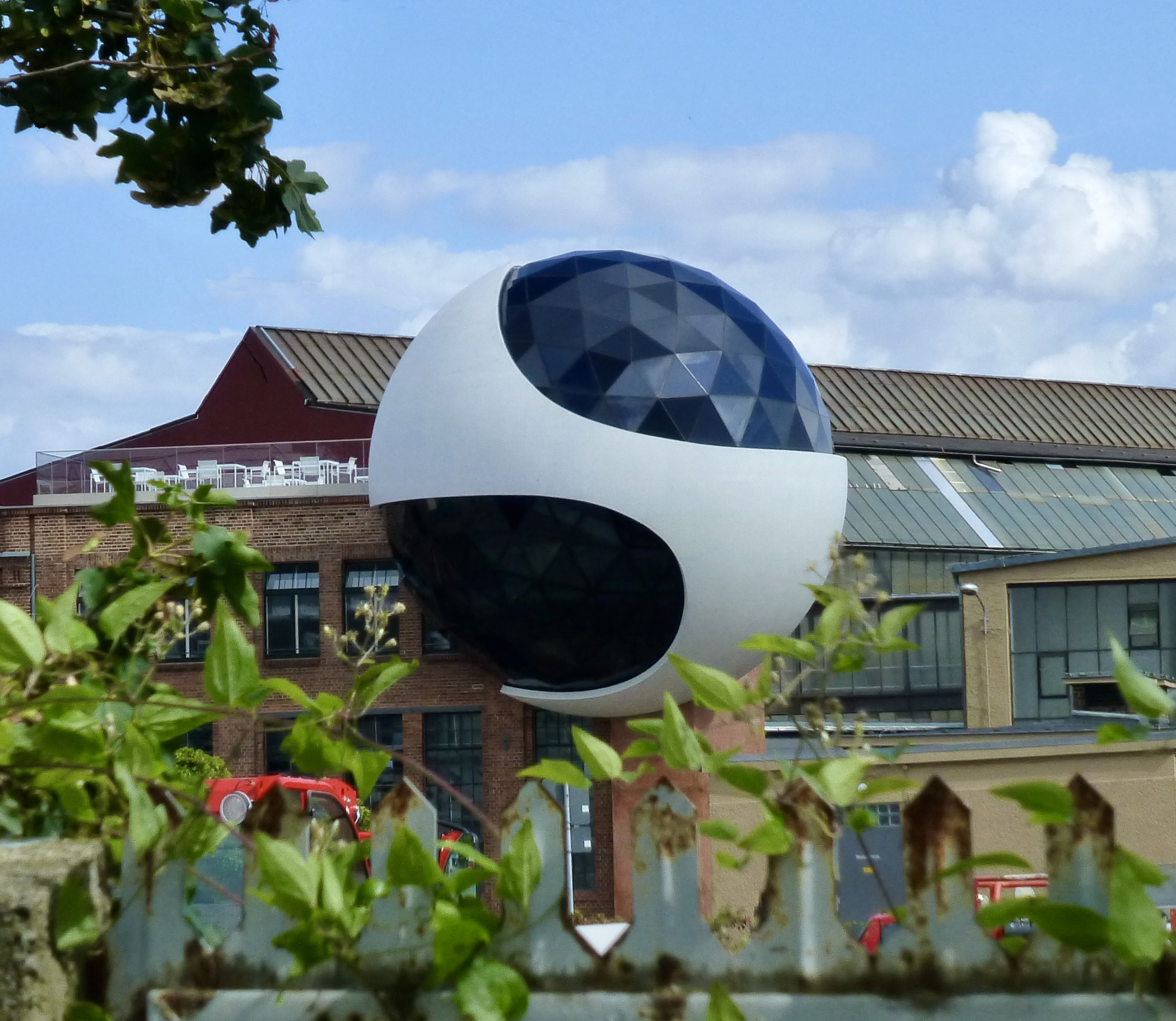 Nach einem Entwurf des brasilianischen Architekten Oscar Niemeyer entstand diese Betonkugel (Techne Sphere) in Leipzig (Plagwitz), Spinnereistraße 13, Nutzung als Café und Gaststätte, Fertigstellung 2020